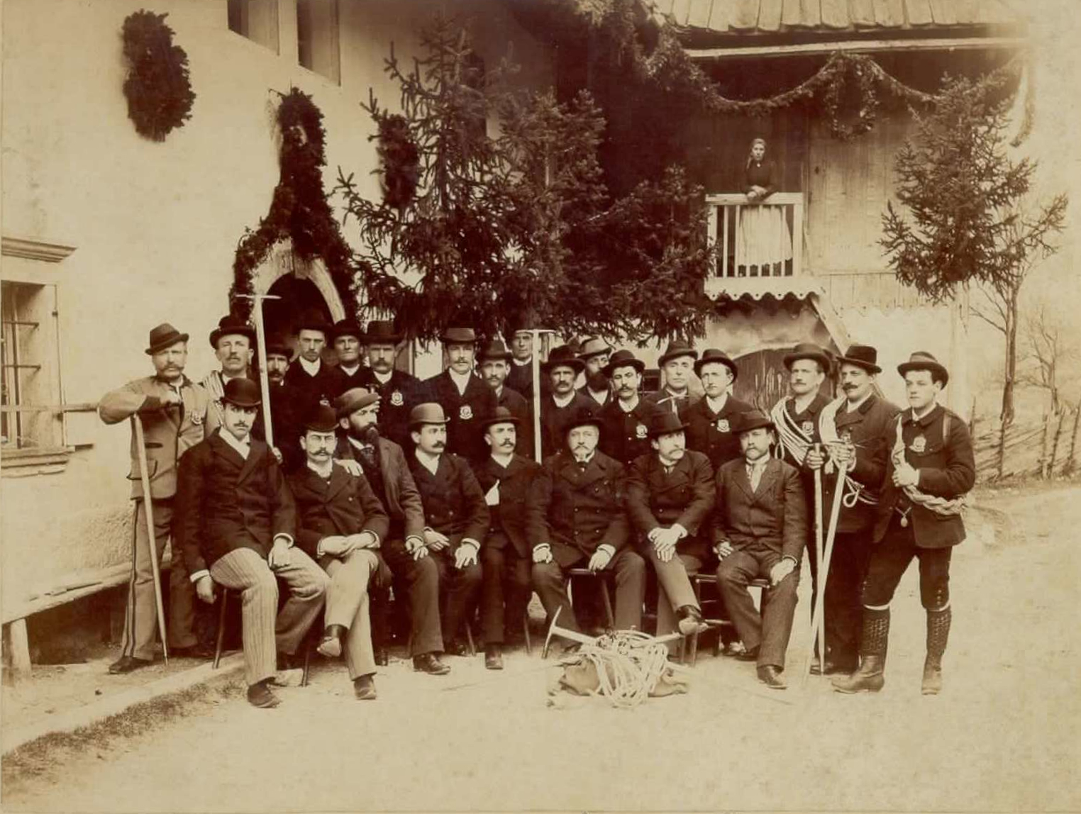 Udeleženci vodniškega tečaja v Mojstrani leta 1894